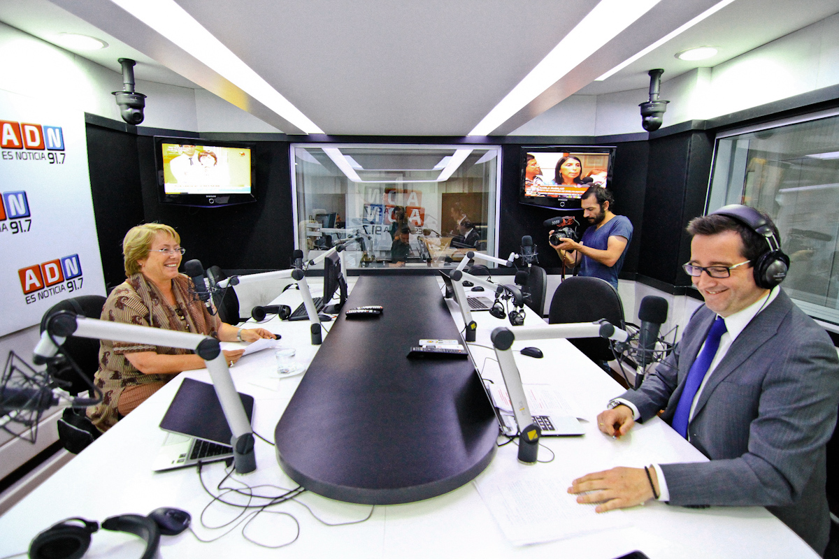 Entrevista a Michelle en Radio ADN 21/11/2013